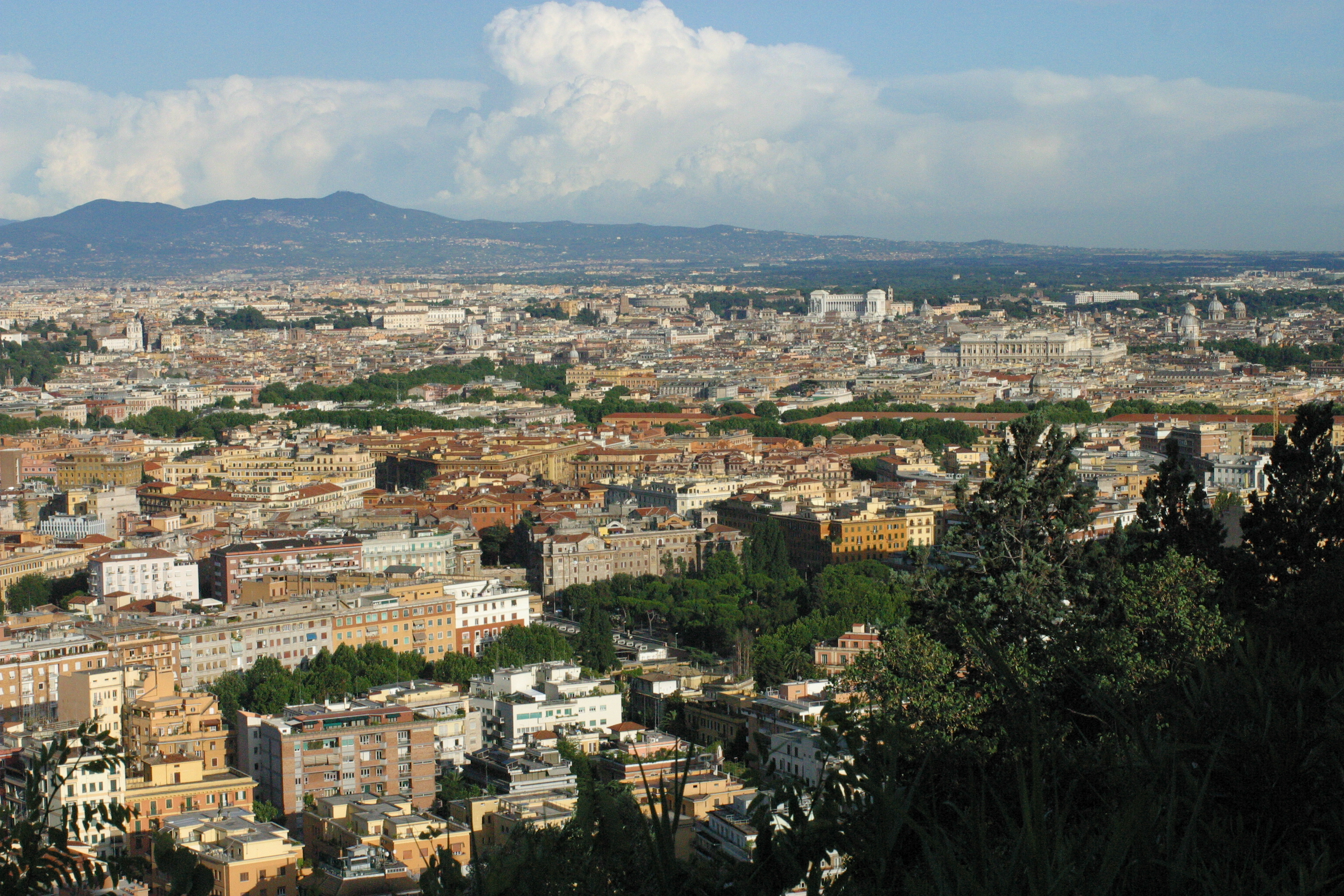 Panorama di Roma da Monte Mario